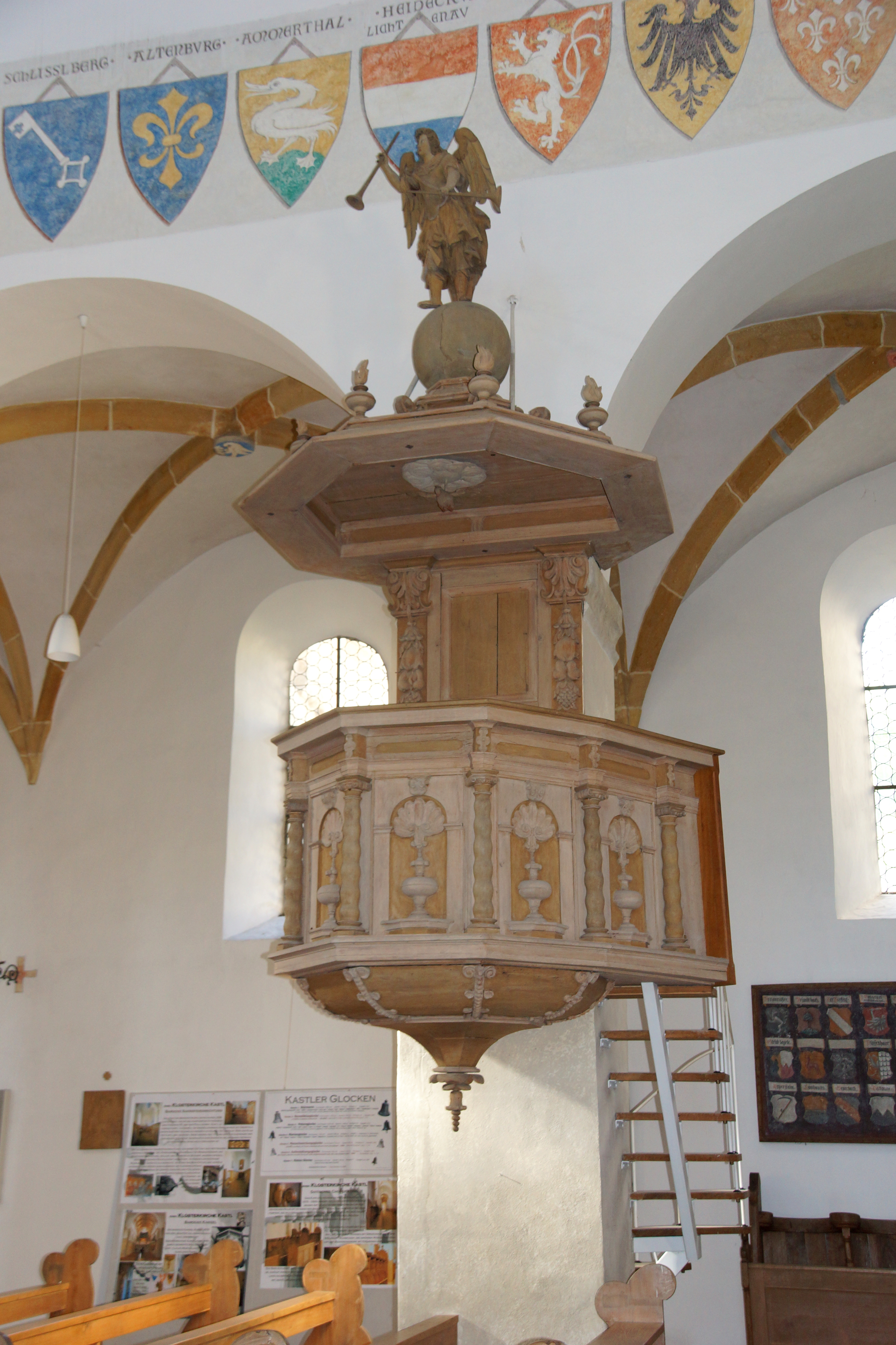 Die katolische Pfarrkirche St. Peter in Kastl im Oberpfälzer Lauterachtal